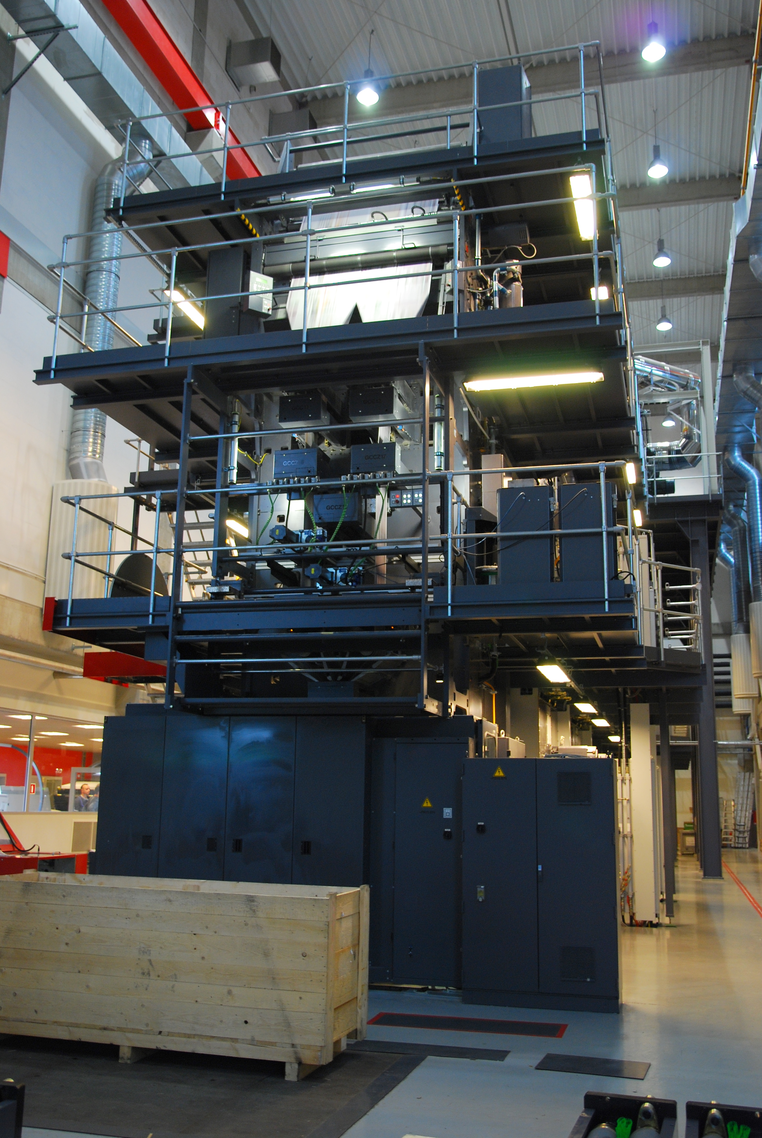 Offsetowa maszyna drukarska "Dziennika Zachodniego" w Sosnowcu